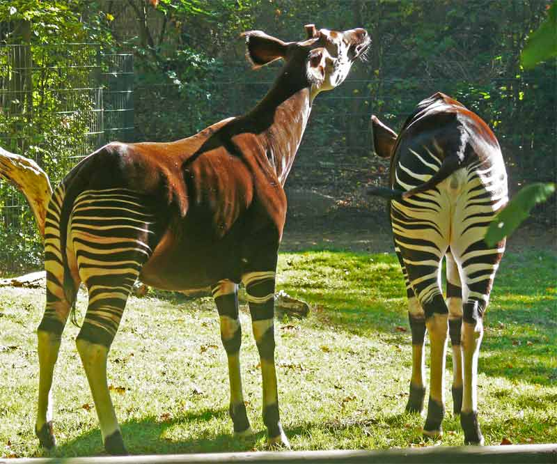 okapi in Zoo of Berlin